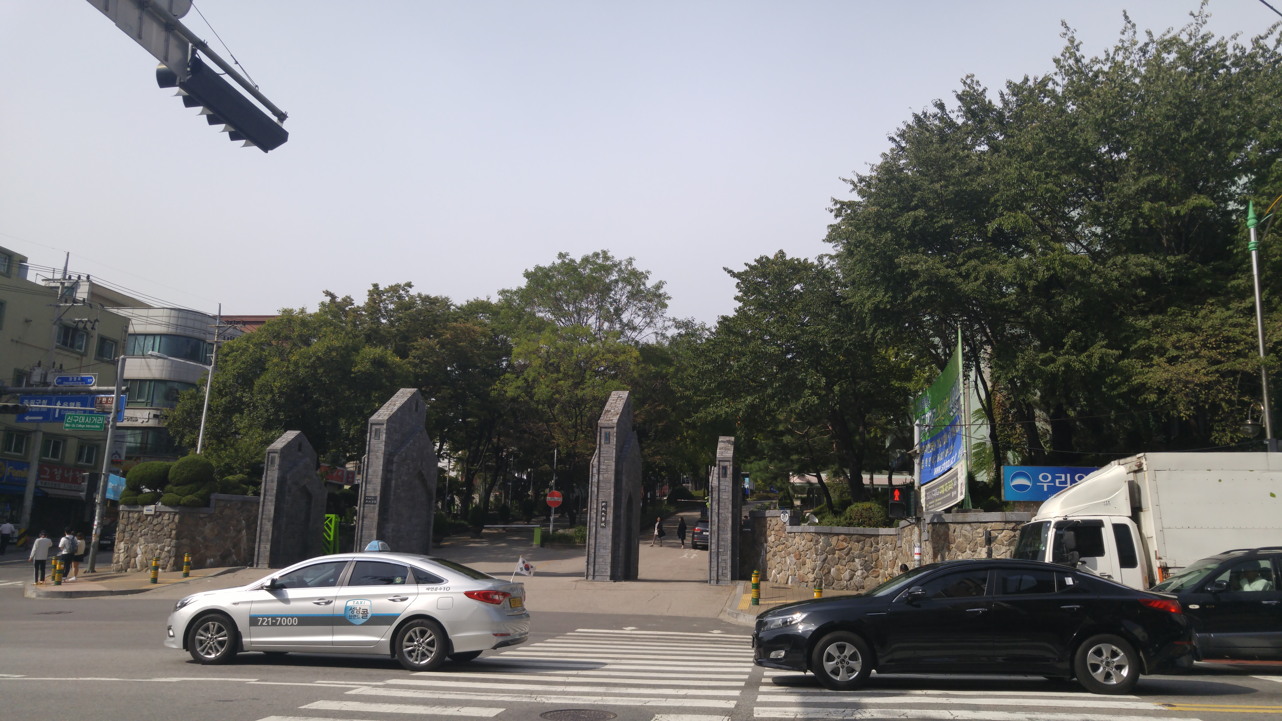 신구대학교 앞